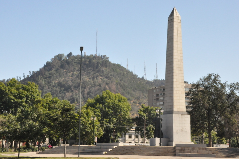 Monumento al Presidente José Manuel Balmaceda en Plaza Balmaceda, Santiago de Chile